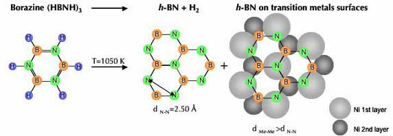 Borazine decomposition